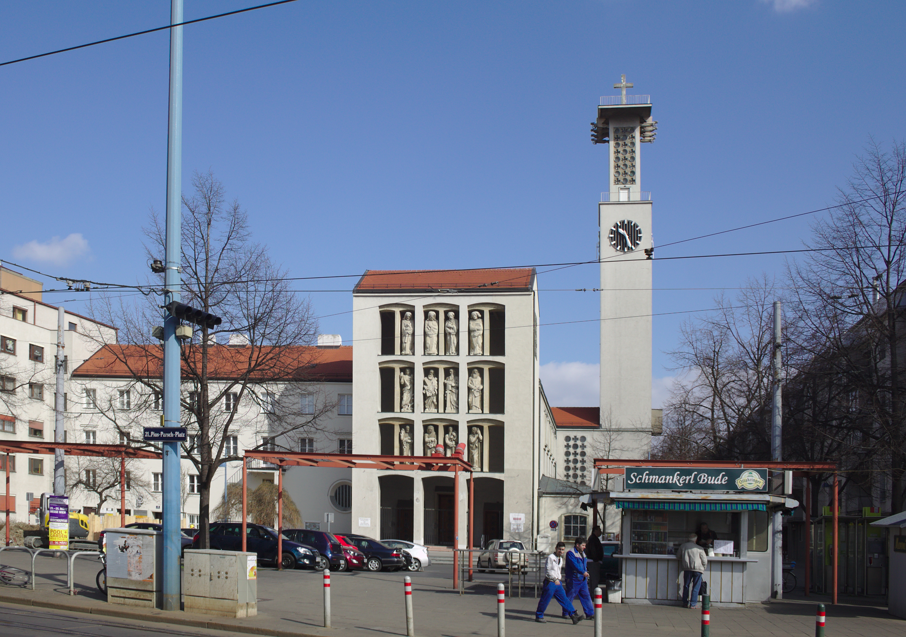 Kath. Pfarrkirche hl. Josef